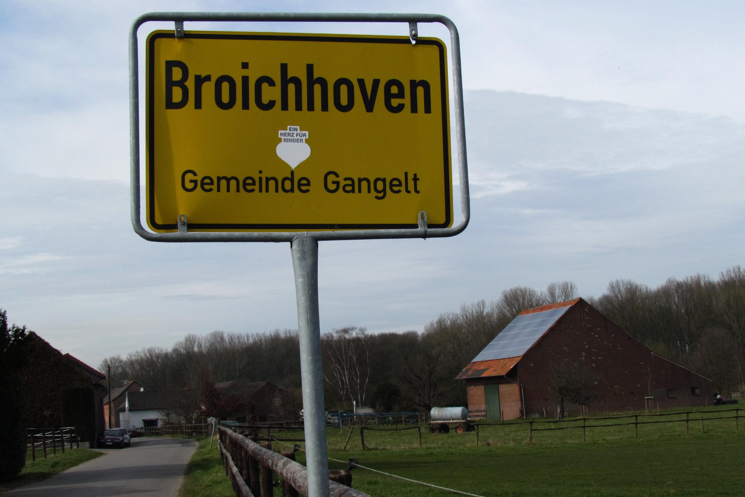 Ortsschild in Broichhoven